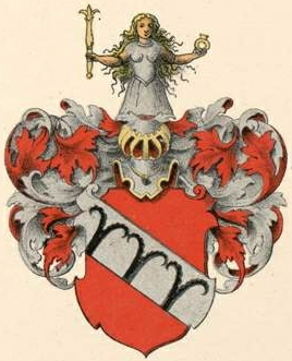 Kaweri suguvõsa aadlivapp